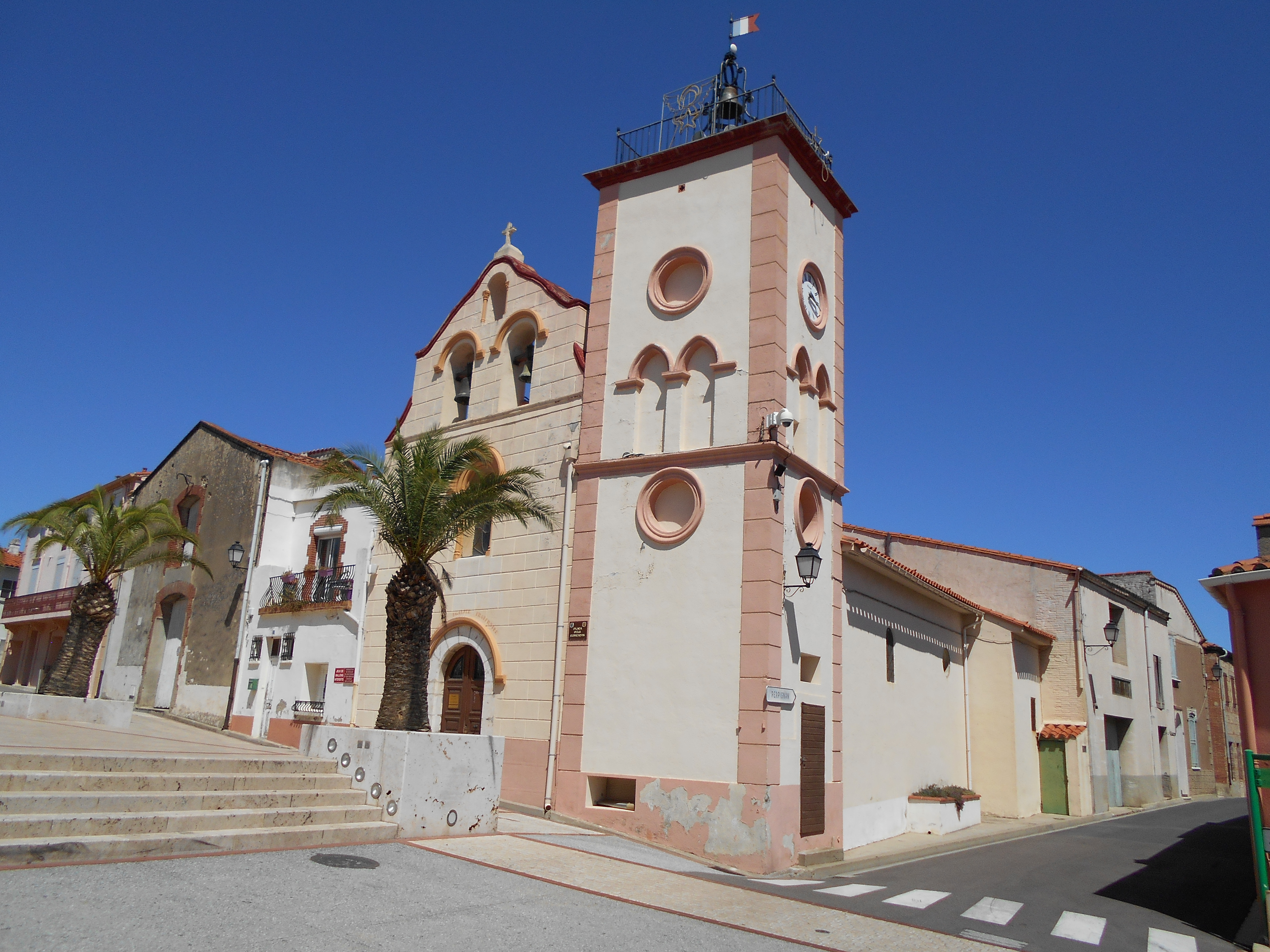 L'església nova. Vista des del sud-oest